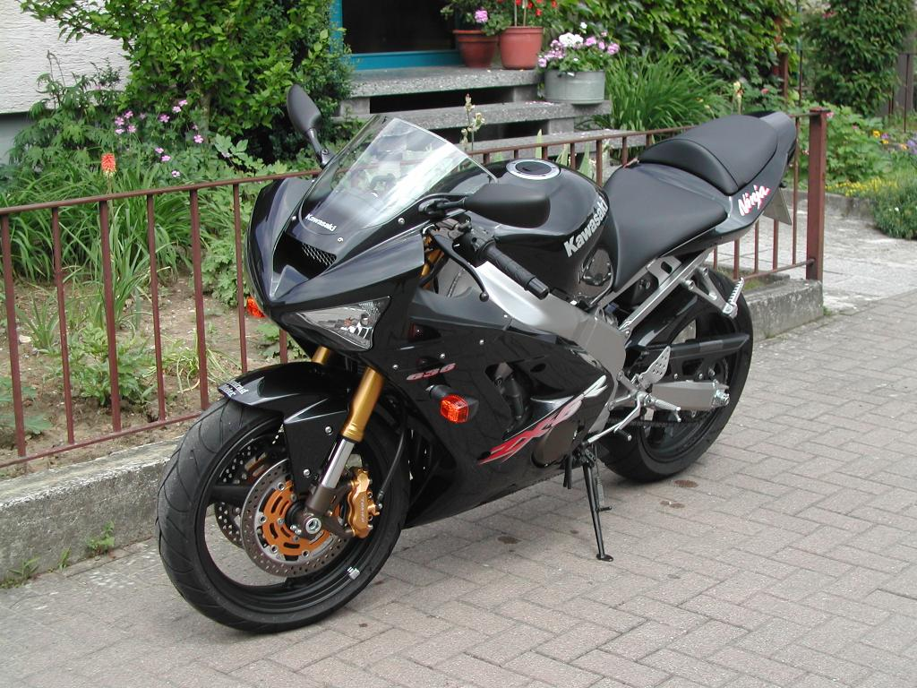 Kawasaki ZX6R 2003